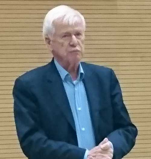 Klaus Hardrath als Redner während einer Veranstaltung